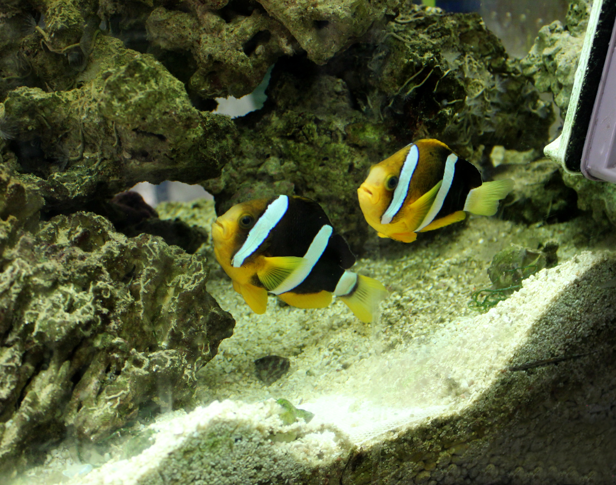 Amphiprion clarkii, pez de acuario de arrecife perteneciente a la familia de los pomacéntridos.